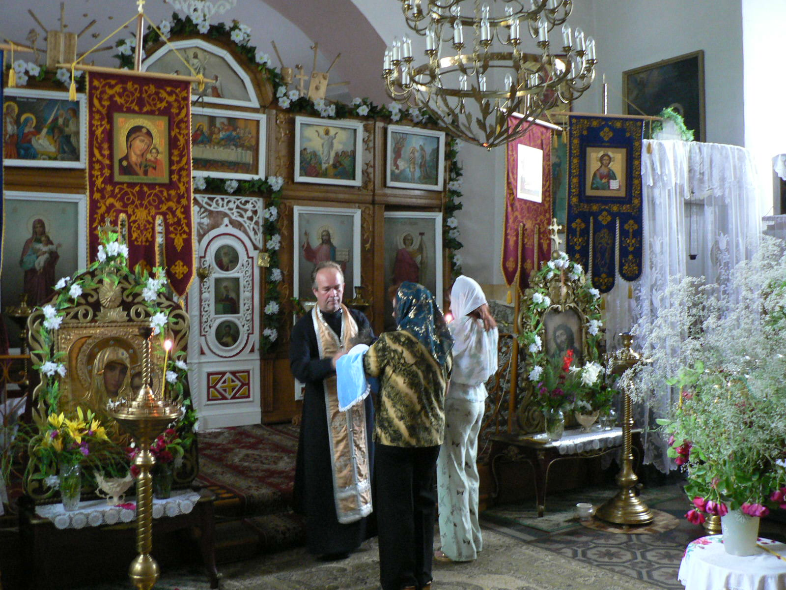 Chrzciny w kobylnickiej cerkwi św. Ilji (św. Proroka Eliasza).